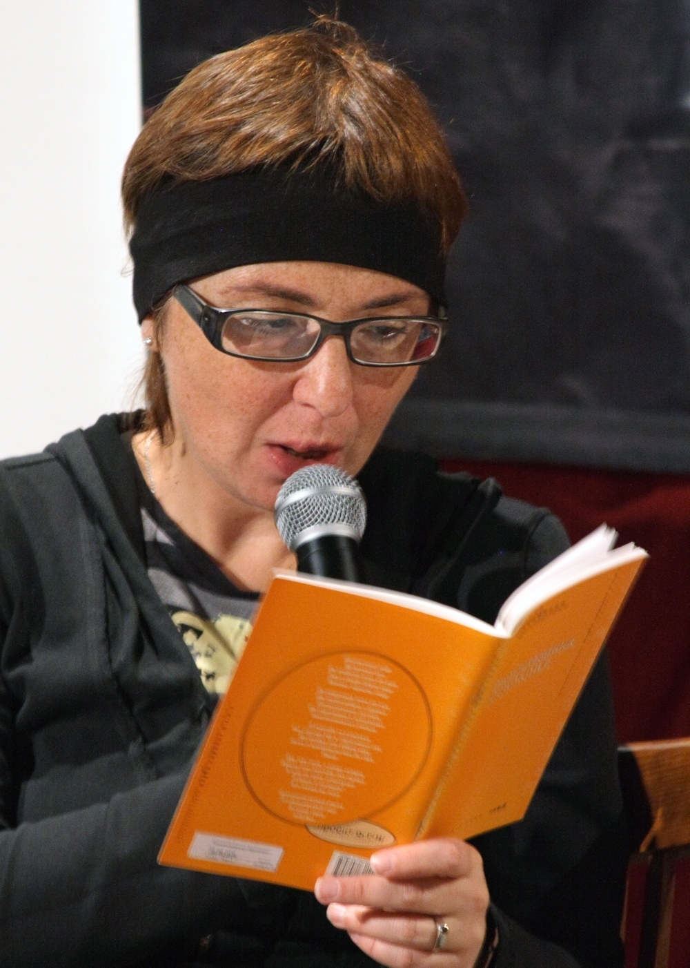 Russian poet Elena Fanailova